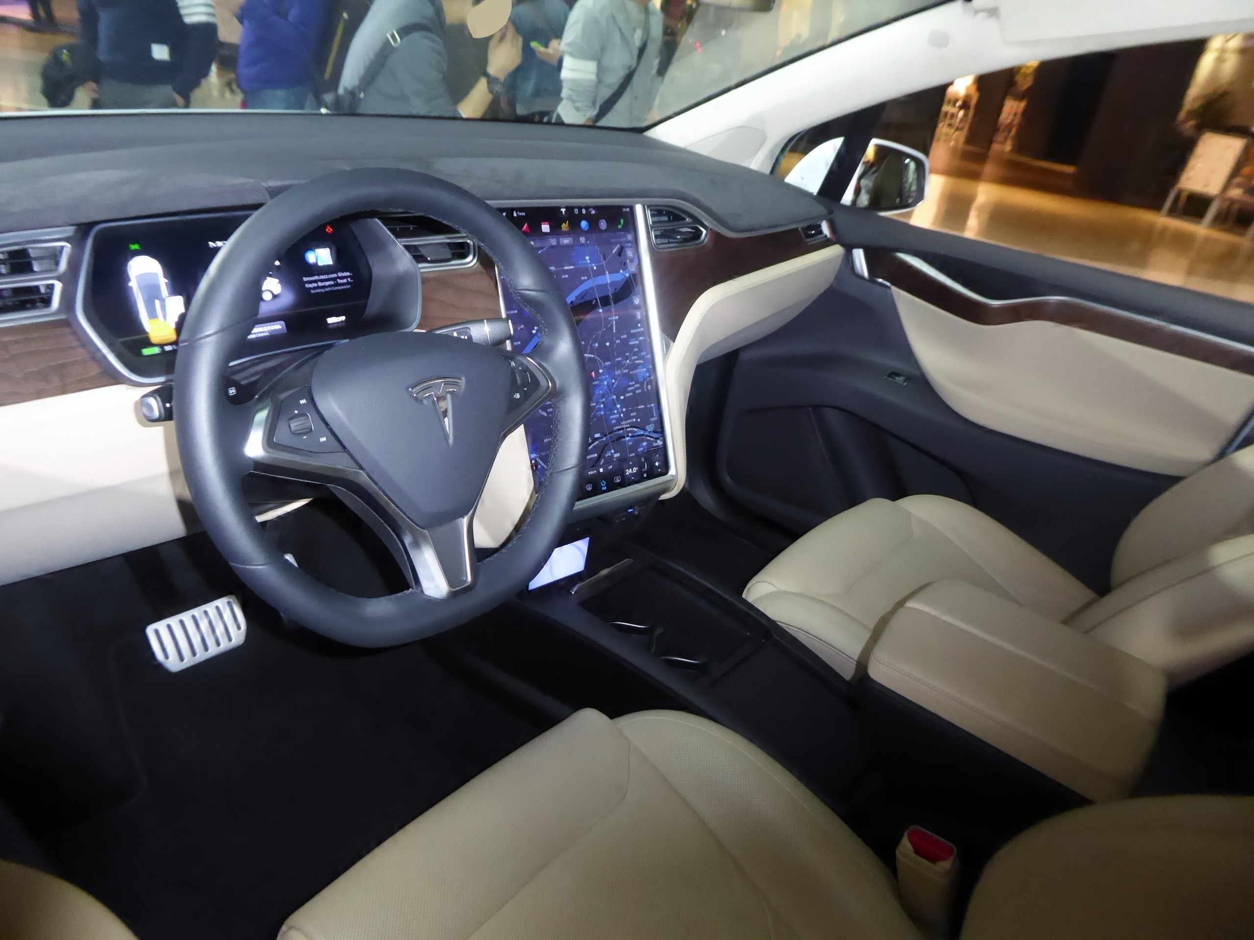 テスラ・モデルX P90Dのインテリアを撮影。